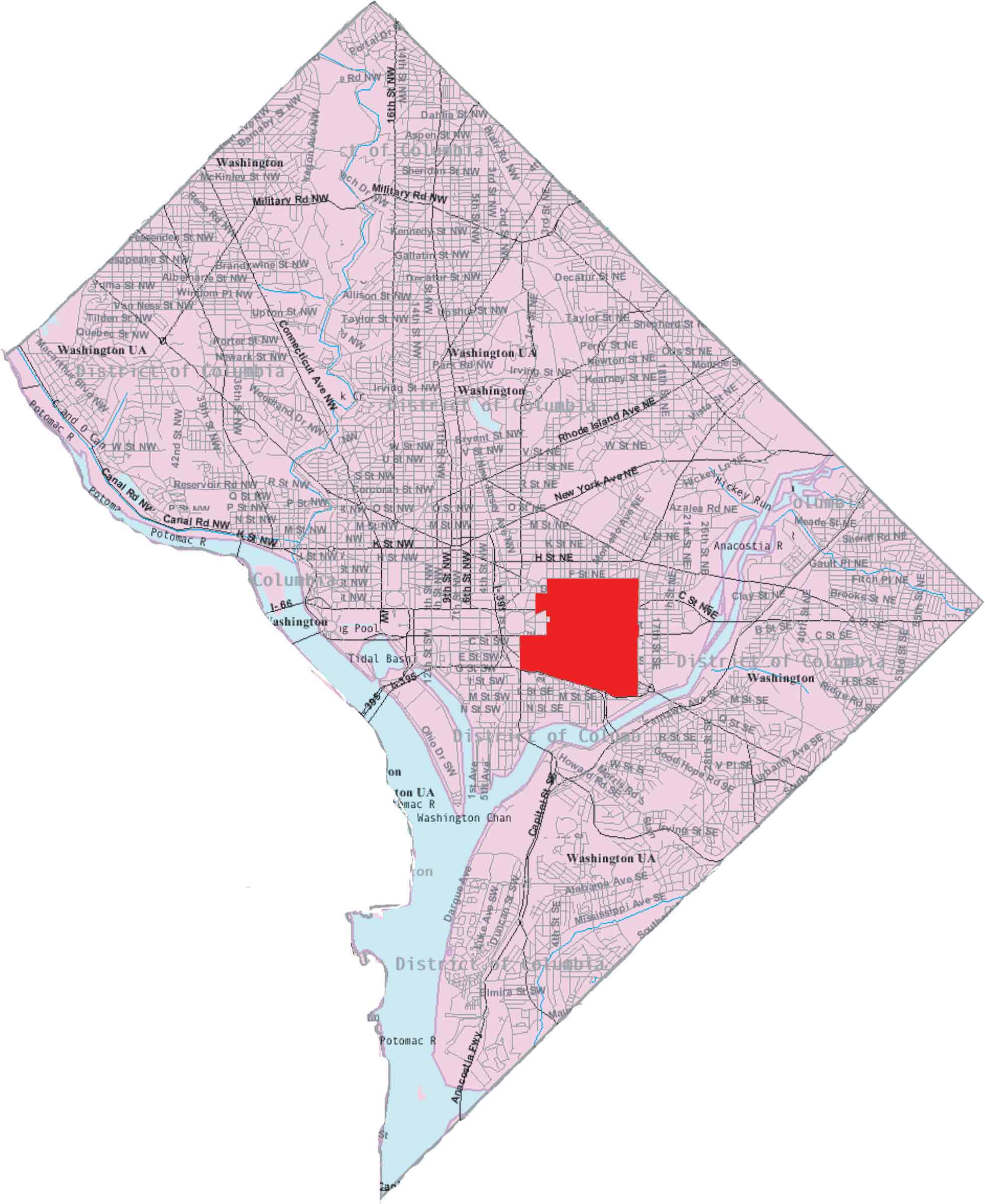 Mapa do bairro Capitol Hill, Washington, D.C.